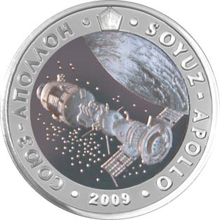 Памятная монета Республики Казахстан «Союз - Аполлон» из серии «Космос» - 500 тенге - серебро - аверс